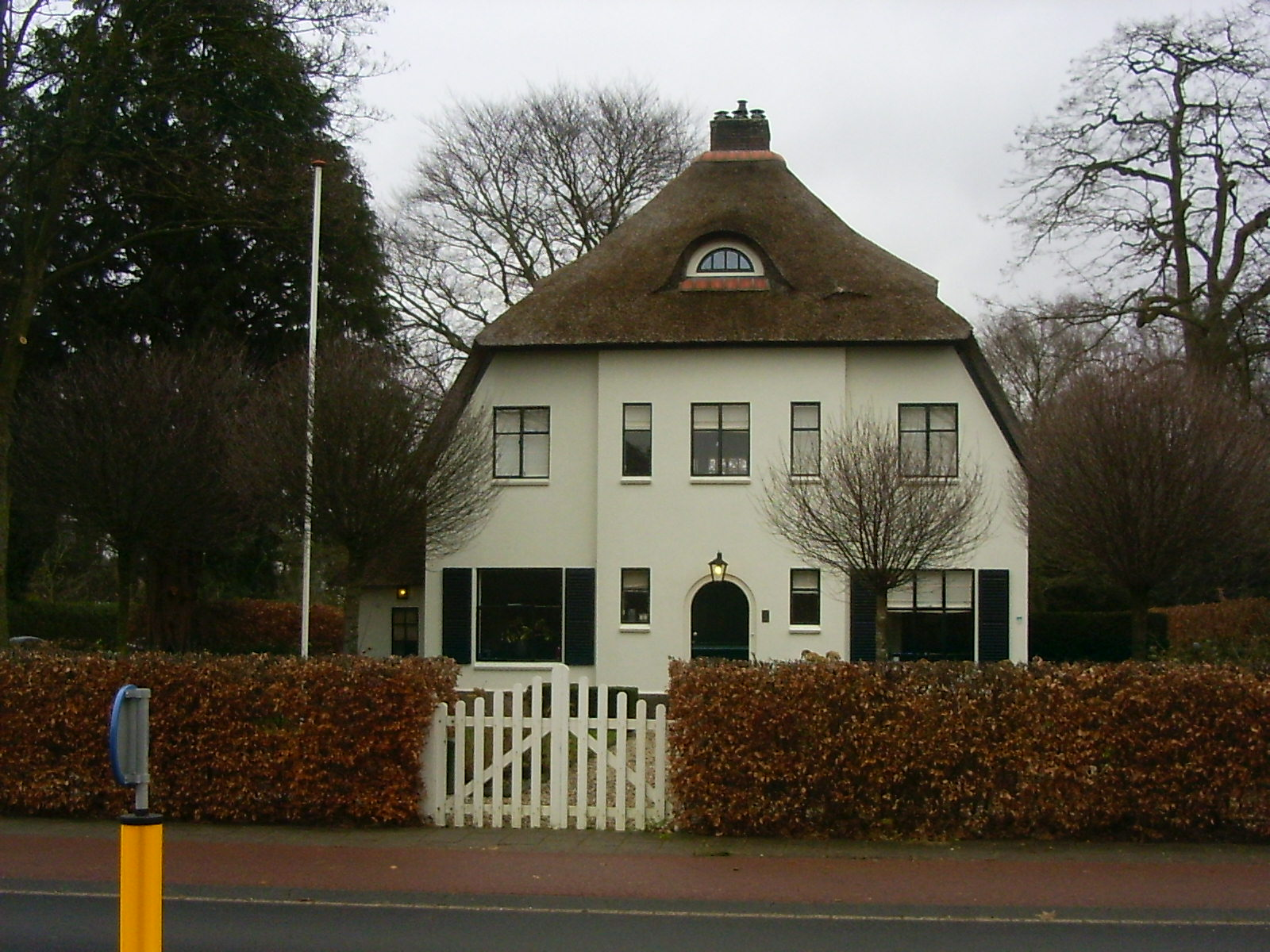 Bennekom, Edeseweg, wit huis achteraan, gemeentelijk monument